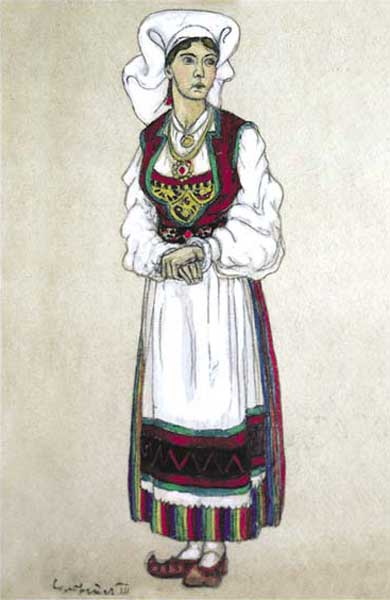 В мае 1911 года Московский Художественный театр заказывает Николаю Рериху декорации и костюмы к пьесе Ибсена "Пер Гюнт".